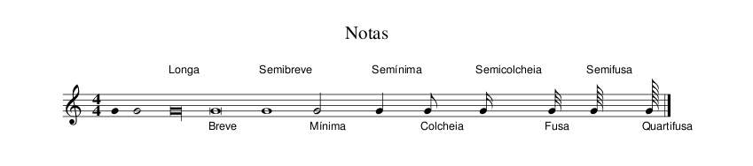 Notas musicais e seus nomes.